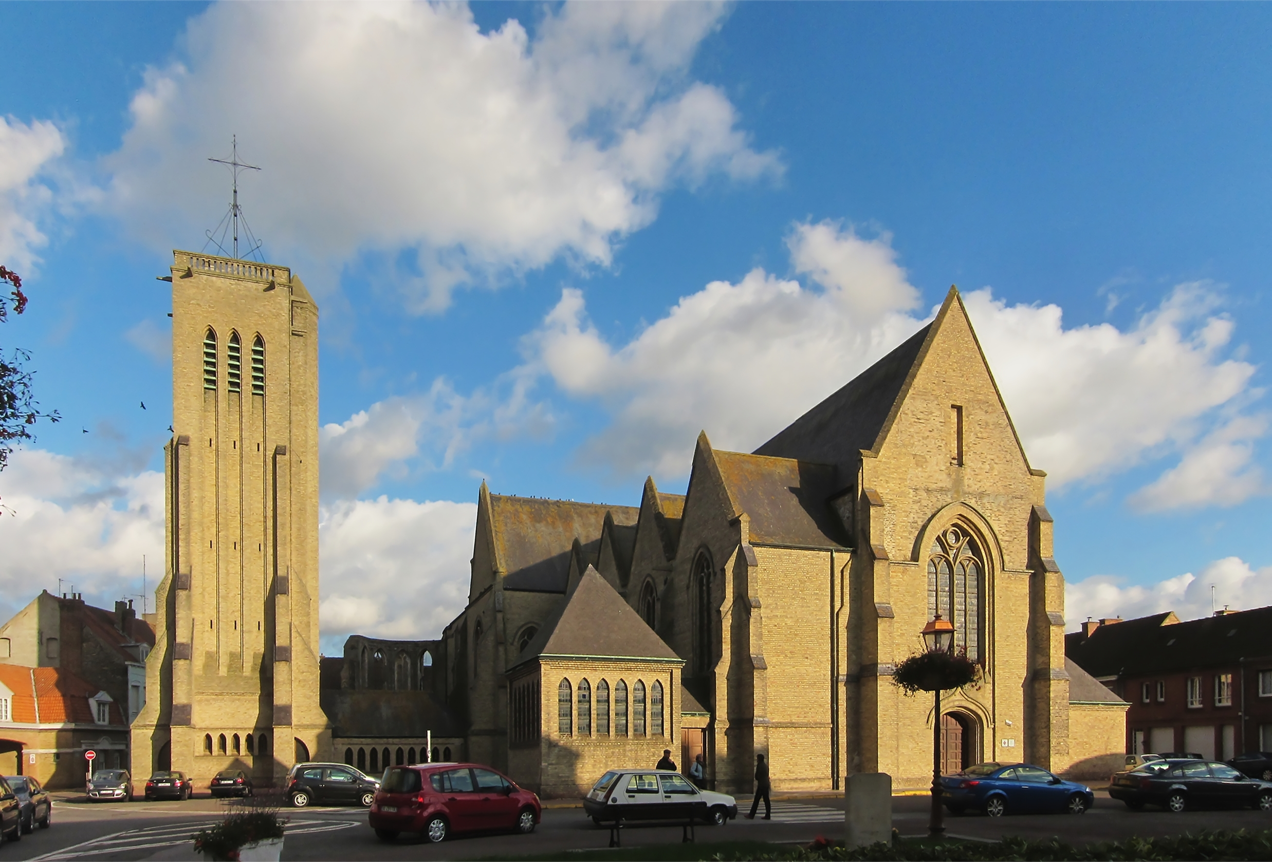 L'Église Saint-Martin de Bergues.